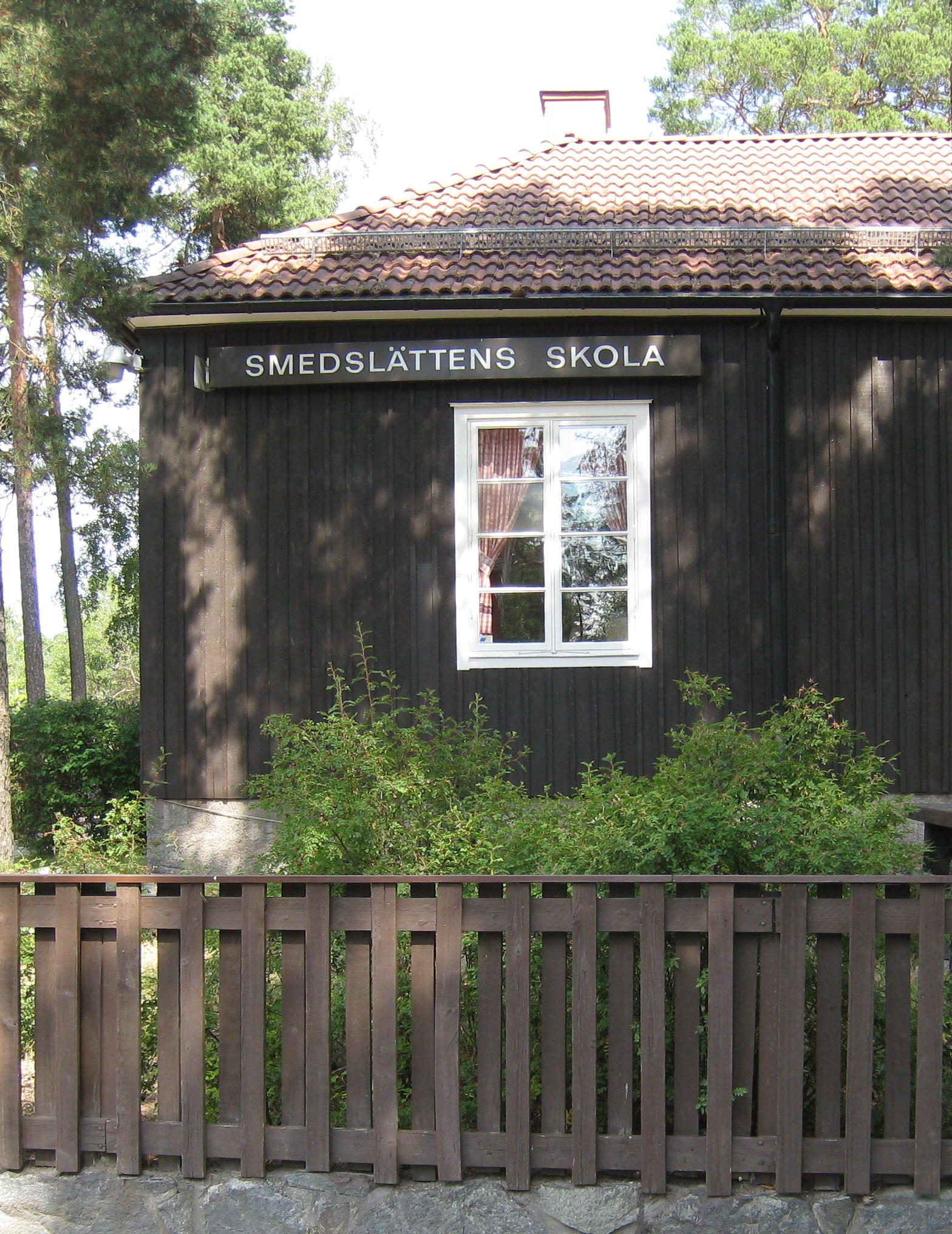 Smedslättsskolan, Bromma, 2013, med skylten på husfasaden.